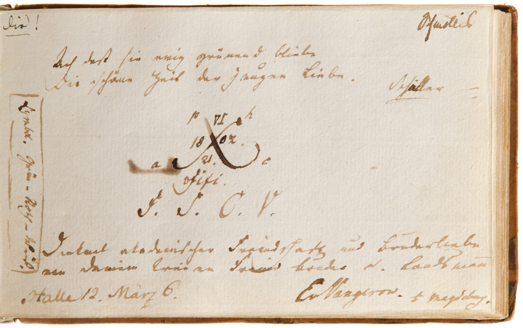 Stammbucheintrag des Wilhelm Eduard von Vangerow vom 12. März 1806 mit altem Stiftungsdatum und Farben, der von der Weiterführung der Saxonia von 1802 auch nach 1804 zeugt.